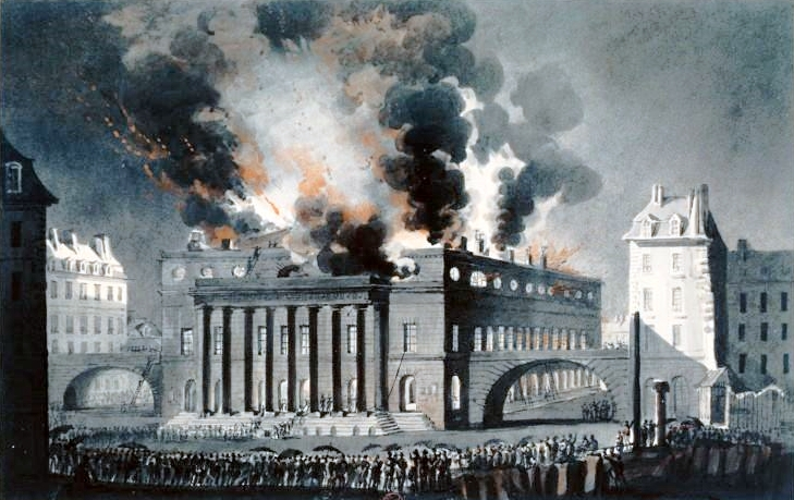 Incendie du théâtre de l'Odéon le 20 mars 1818. Lavis à l'encre de Chine et aquarelle, 21,6 x 34,1 cm, par J. D. Périel (17??-18??).